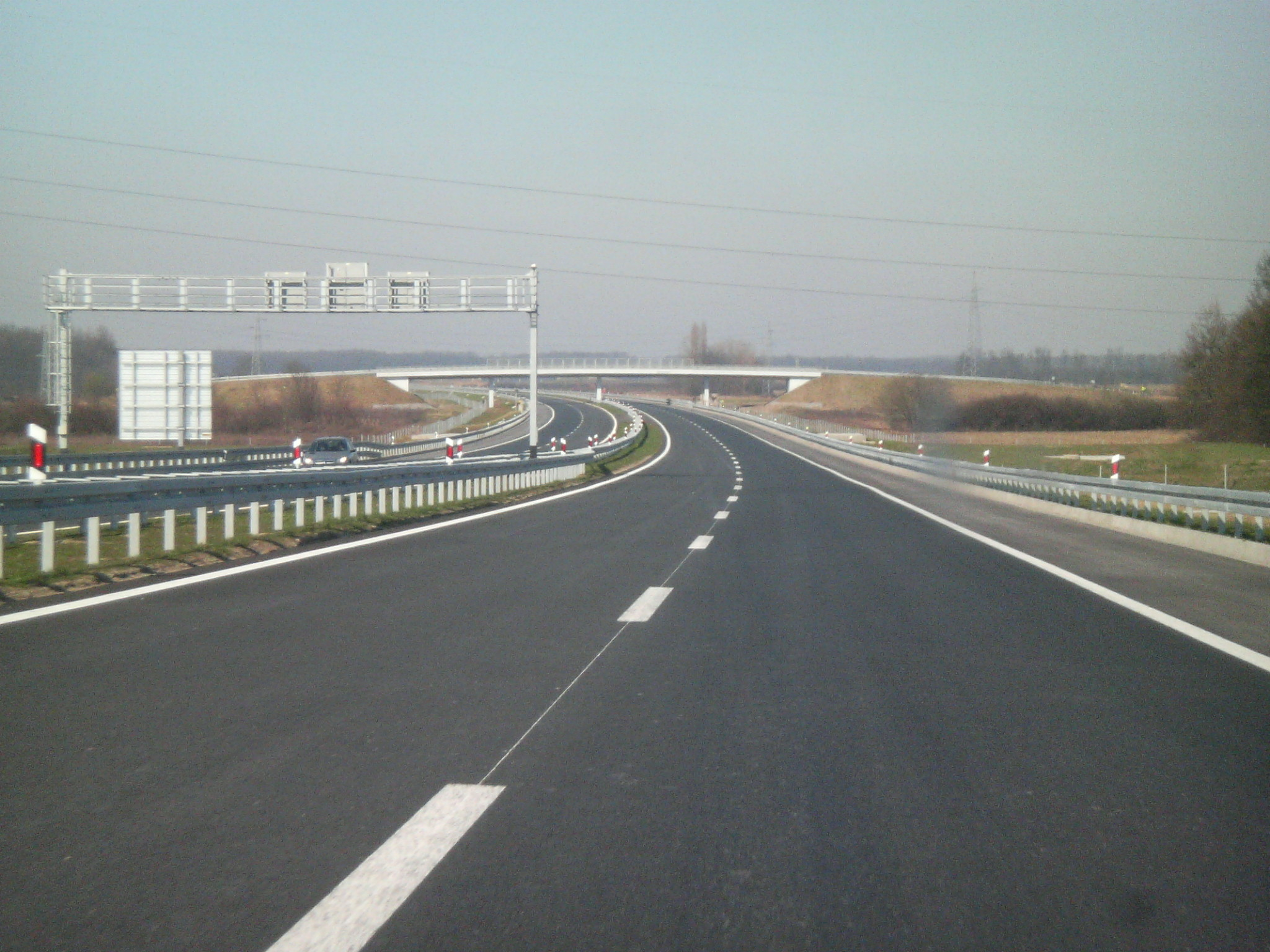 Hrvatska autocesta A5.